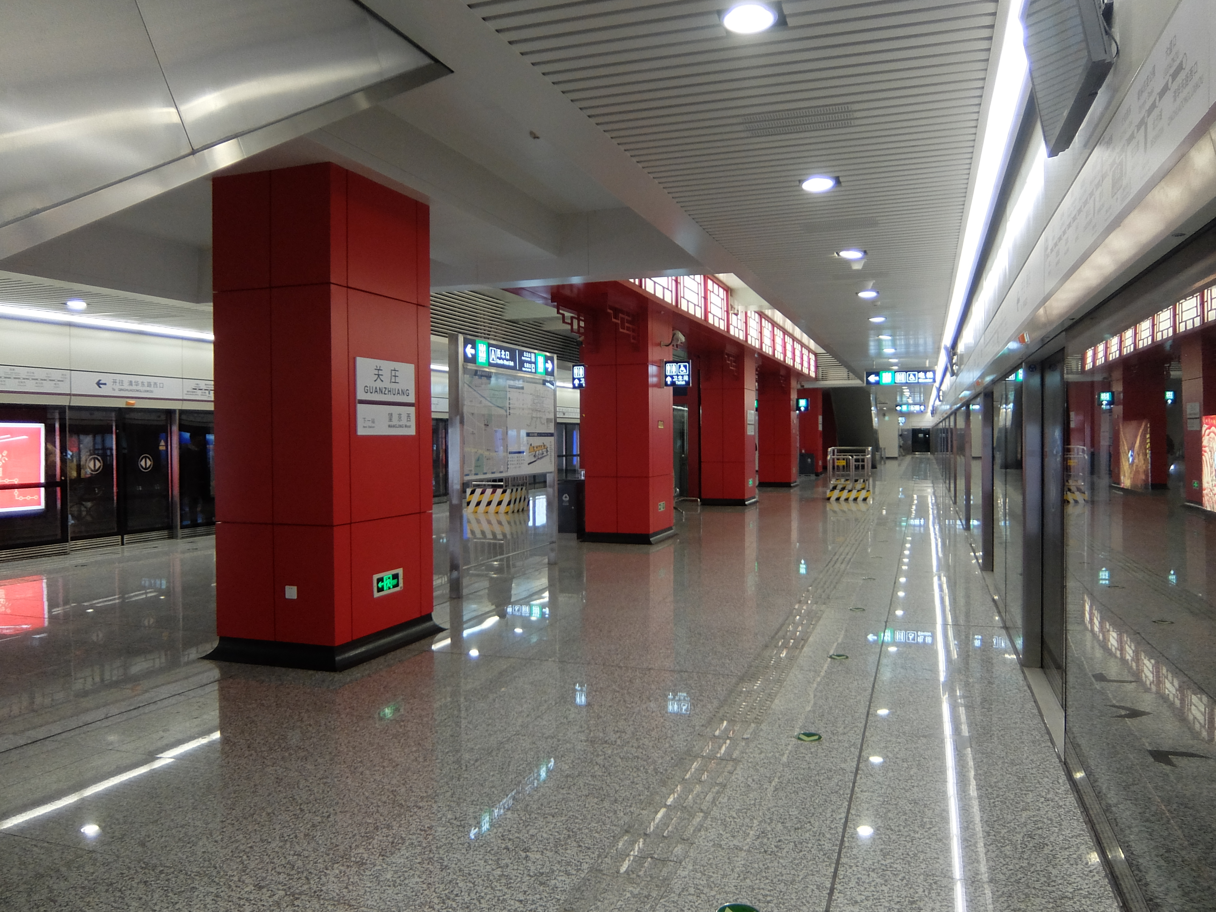 北京地铁15号线关庄站站台